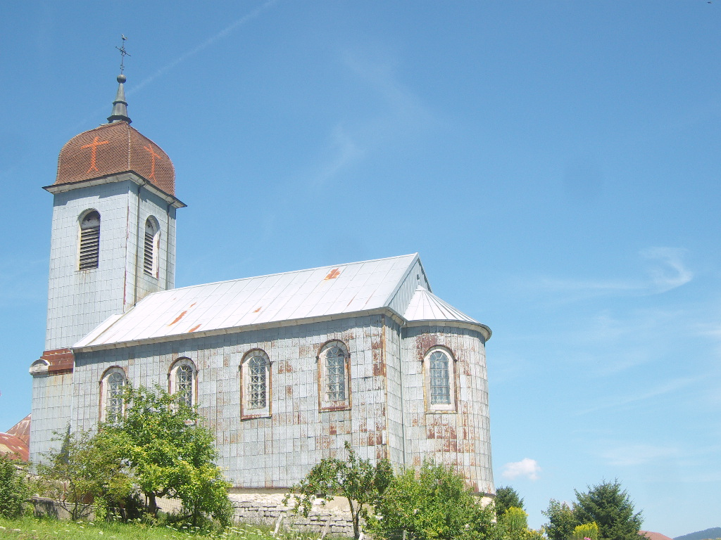 église de Gellin (Doubs - France)